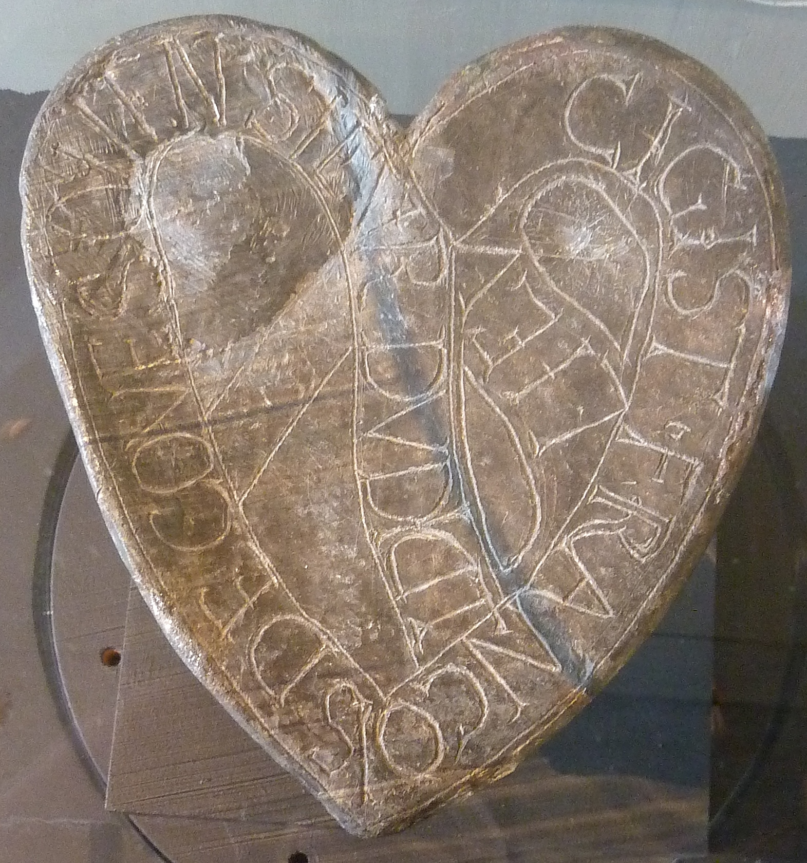 Plouasne : étui en plomb contenant le cœur de François de Coëtquen, décédé le 6 mars 1557. L'éviscération du cadavre était souvent pratiquée dans les milieux aristocratiques. Cette coutume permettait de montrer son attachement à plusieurs lieux. François de Coëtquen fut inhumé dans l'église des Jacobins à Dinan, mais son cœur reposa pendant plus de cinq siècles aux côtés du corps de son épouse à Plouasne jusqu'à sa découverte en 1905 par des ouvriers qui procédaient à l'abattage d'un mur. Il fut alors offert en 1908 au musée de Dinan par l'un de ses descendants.